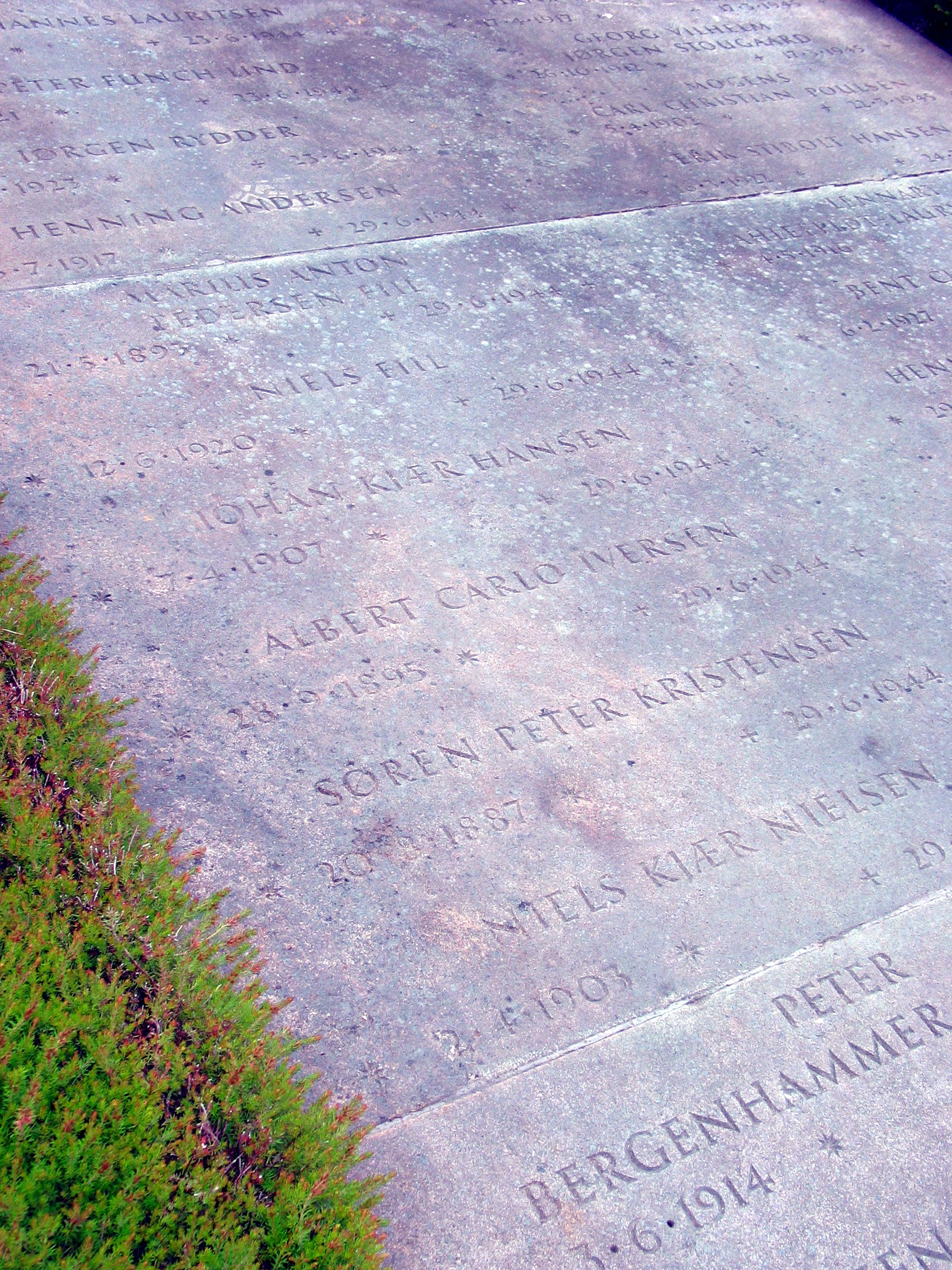 Mindesten nedlagt i Mindelunden i Ryvangen. En del af inskriptionen er: PETER FUNCH LIND * + 23.6.1944 + IØRGEN RYDDER .1923 * + 23.6.1944 + HENNING ANDERSEN .7.1917 * + 29.6.1944 + MARIUS ANTON PEDERSEN FIIL 21.5.1893 * + 29.6.1944 + NIELS FIIL * 12.6.1920 * + 29.6.1944 + IOHAN KIÆR HANSEN * 7.4.1907 * + 29.6.1944 + ALBERT CARLO IVERSEN * 28.9.1895 * + 29.6.1944 + SØREN PETER KRISTENSEN * 20.8.1887 * + 29.6.1944 + NIELS KIÆR NIELSEN * 2.4.1903 * + 29 PETER BERGENHAMMER * 3.6.1914 *